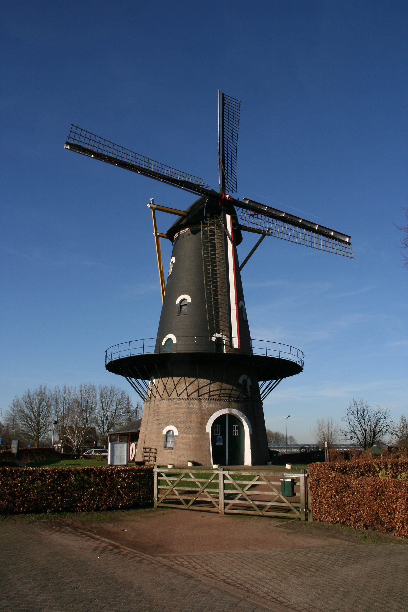 Oisterwijk: Kerkhovense Molen (ook wel Onvermoeid geheten), gezien vanaf de toegangsweg naar de molen